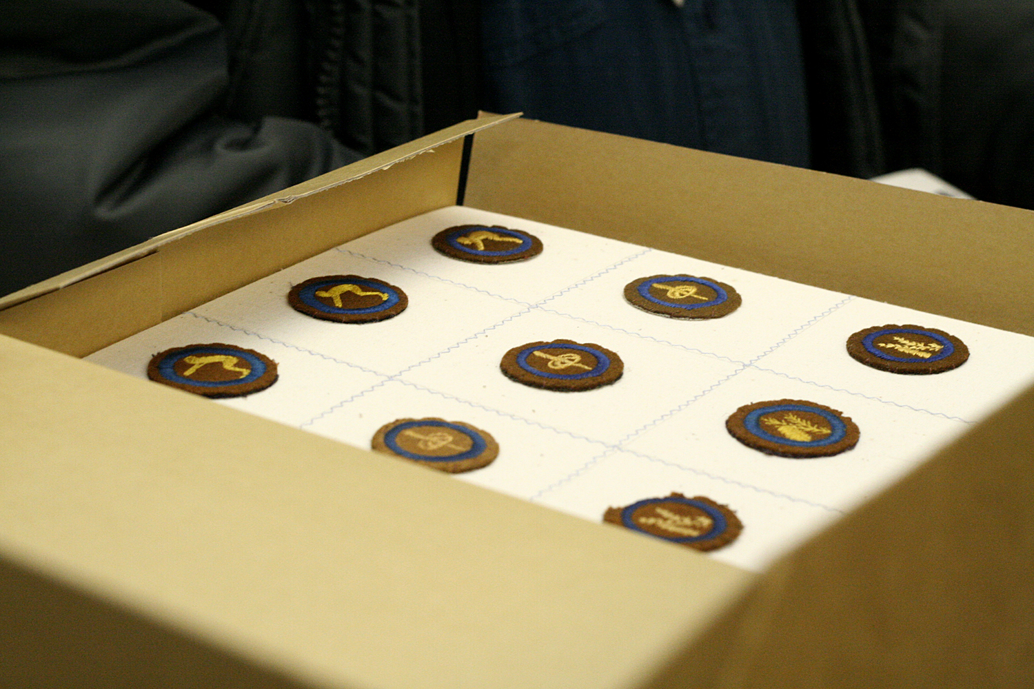 Del av samlingen på scoutmuseet.